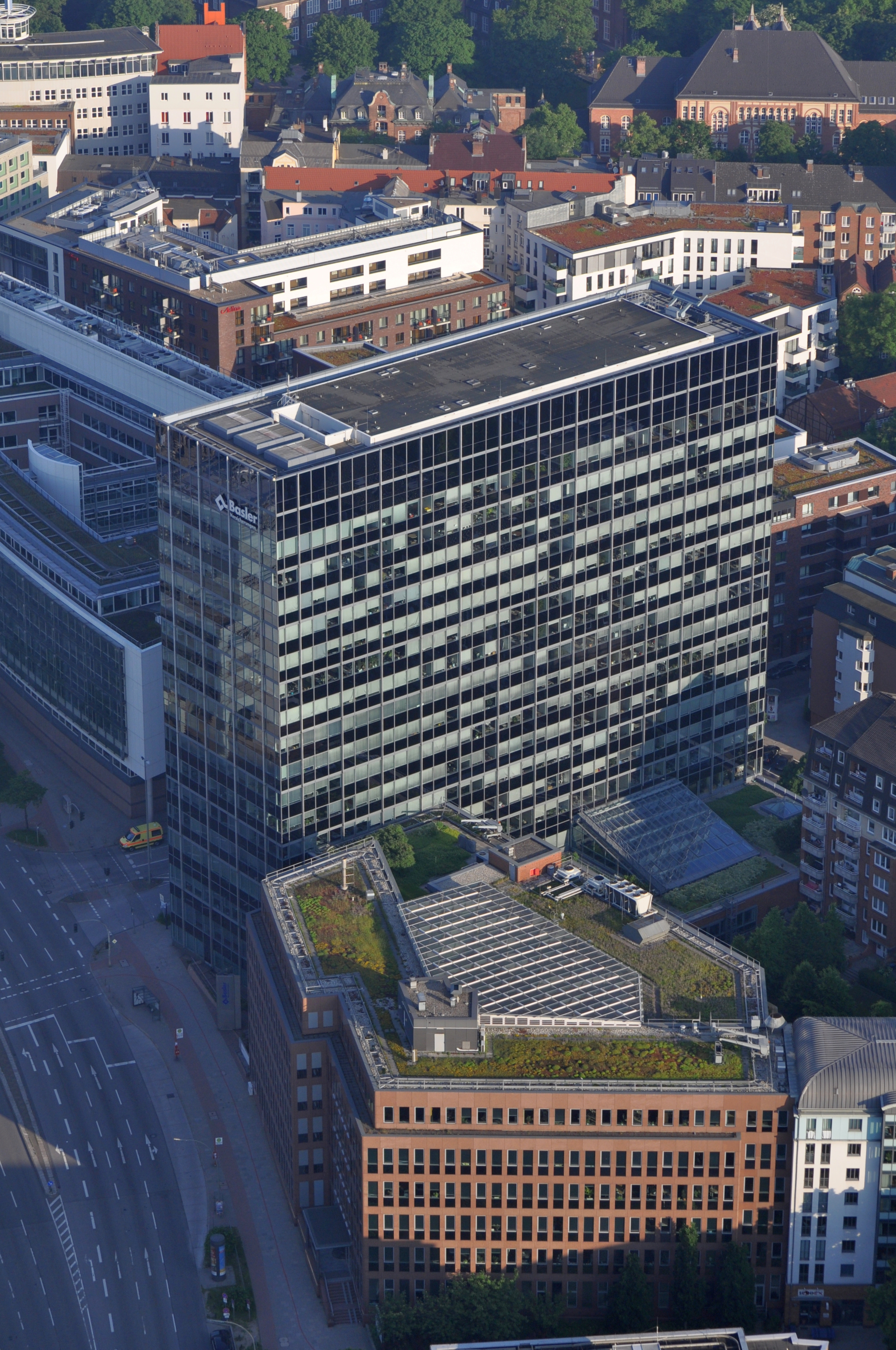 Gebäude der Basler Versicherungen (ehemals Deutscher Ring) in Hamburg-Neustadt.